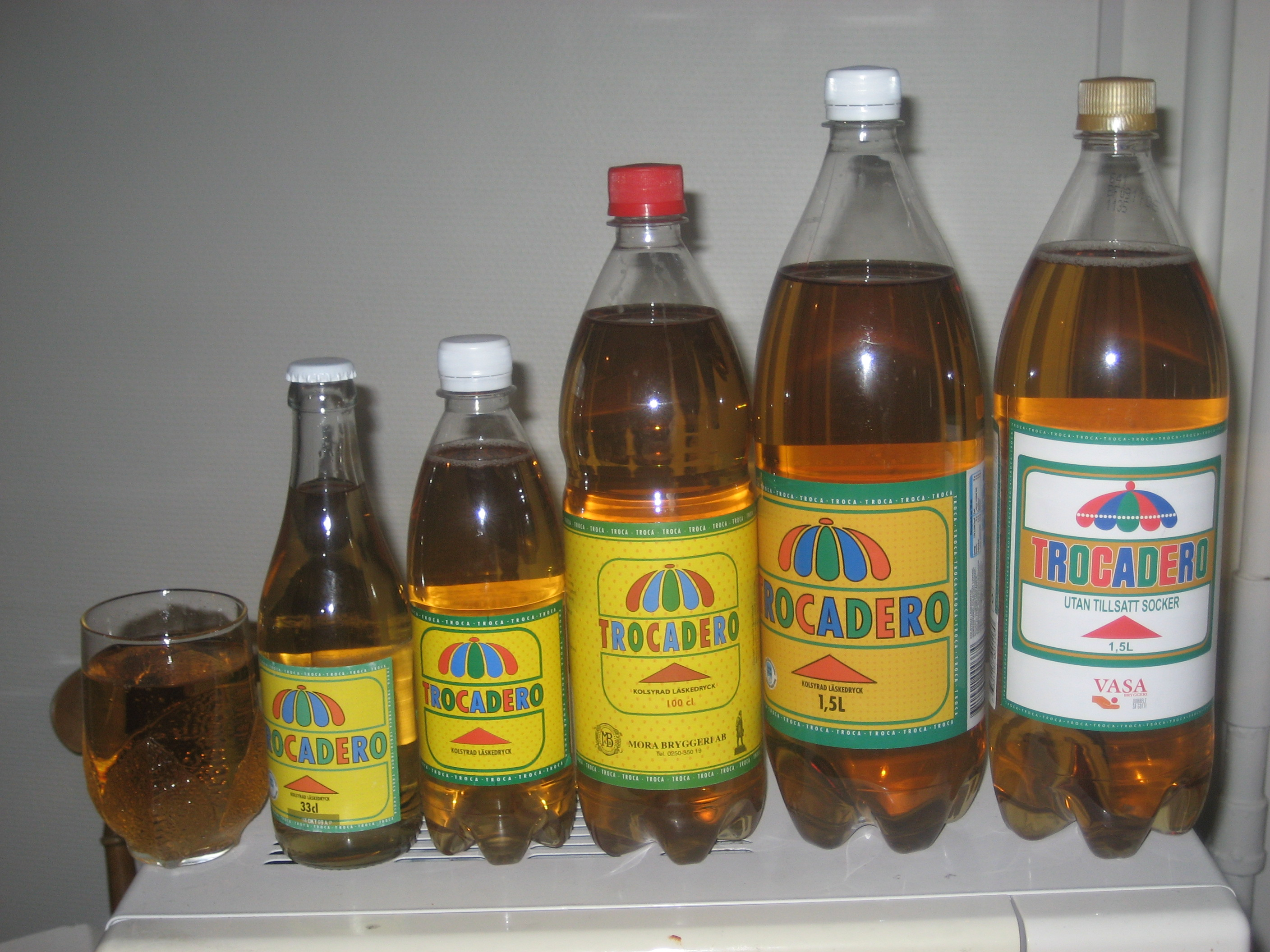 Trocadero i fem olika flaskformat - 33 cl flaska, 50 cl pet-flaska, 1 liter, 1.5 liter, 1.5 liter utan tillsatt socker. Glas med upphälld Trocadero längst till vänster.